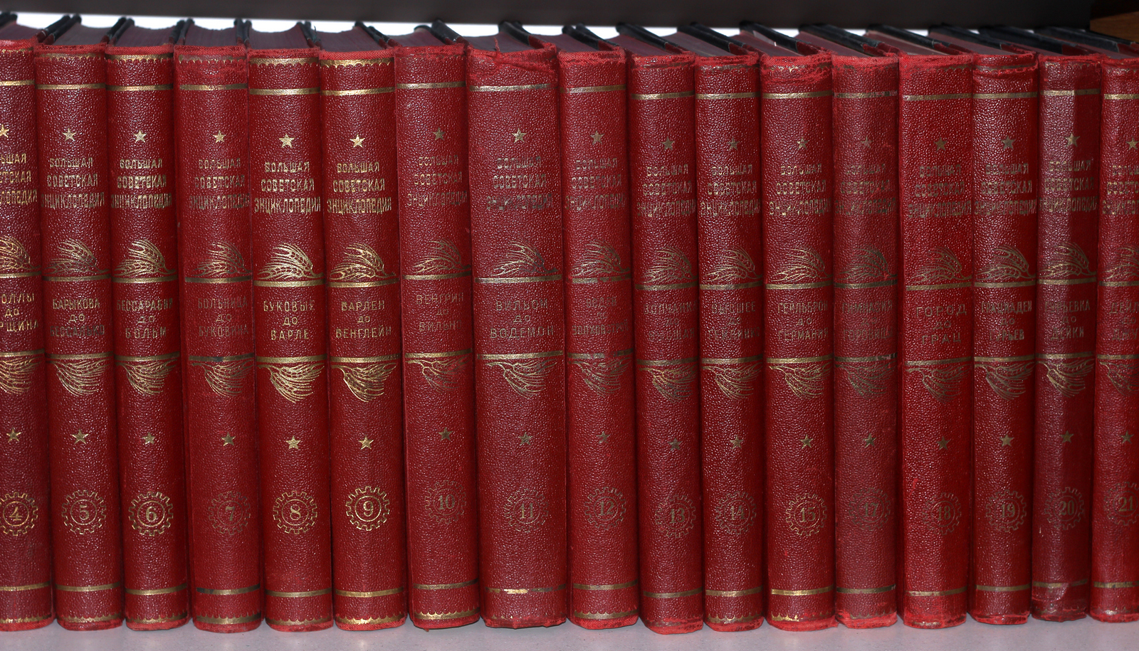 Большая советская энциклопедия - первое издание.